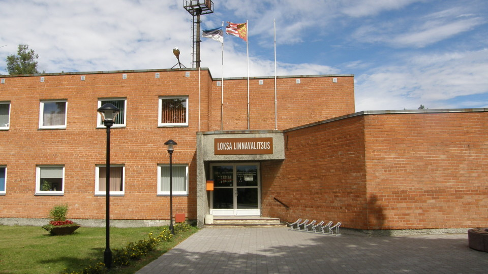 Loksa linnavalitsuse hoone